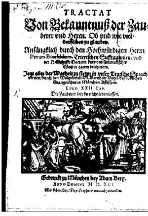 Exportiert aus :bild:Binsfeld-2.doc, dort hochauflösendere Version Upload eines Users als Doc-Datei; Lizenz: Gemeinfrei.